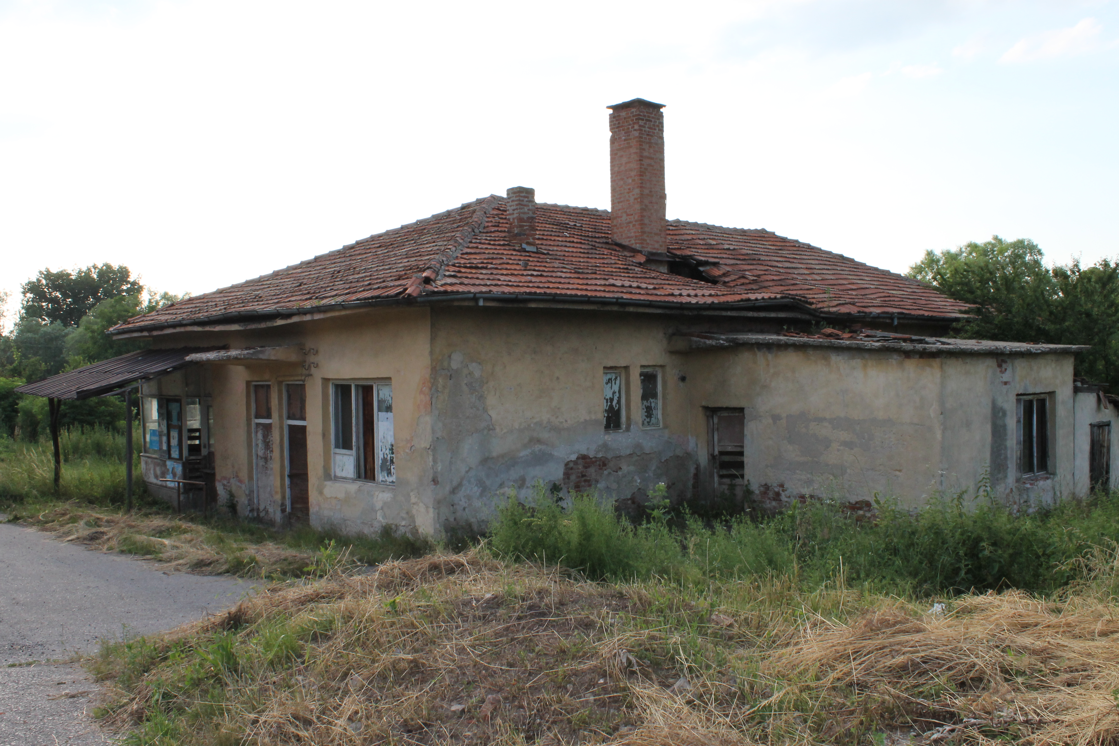 Някогашната хлебарница в с. Стефаново